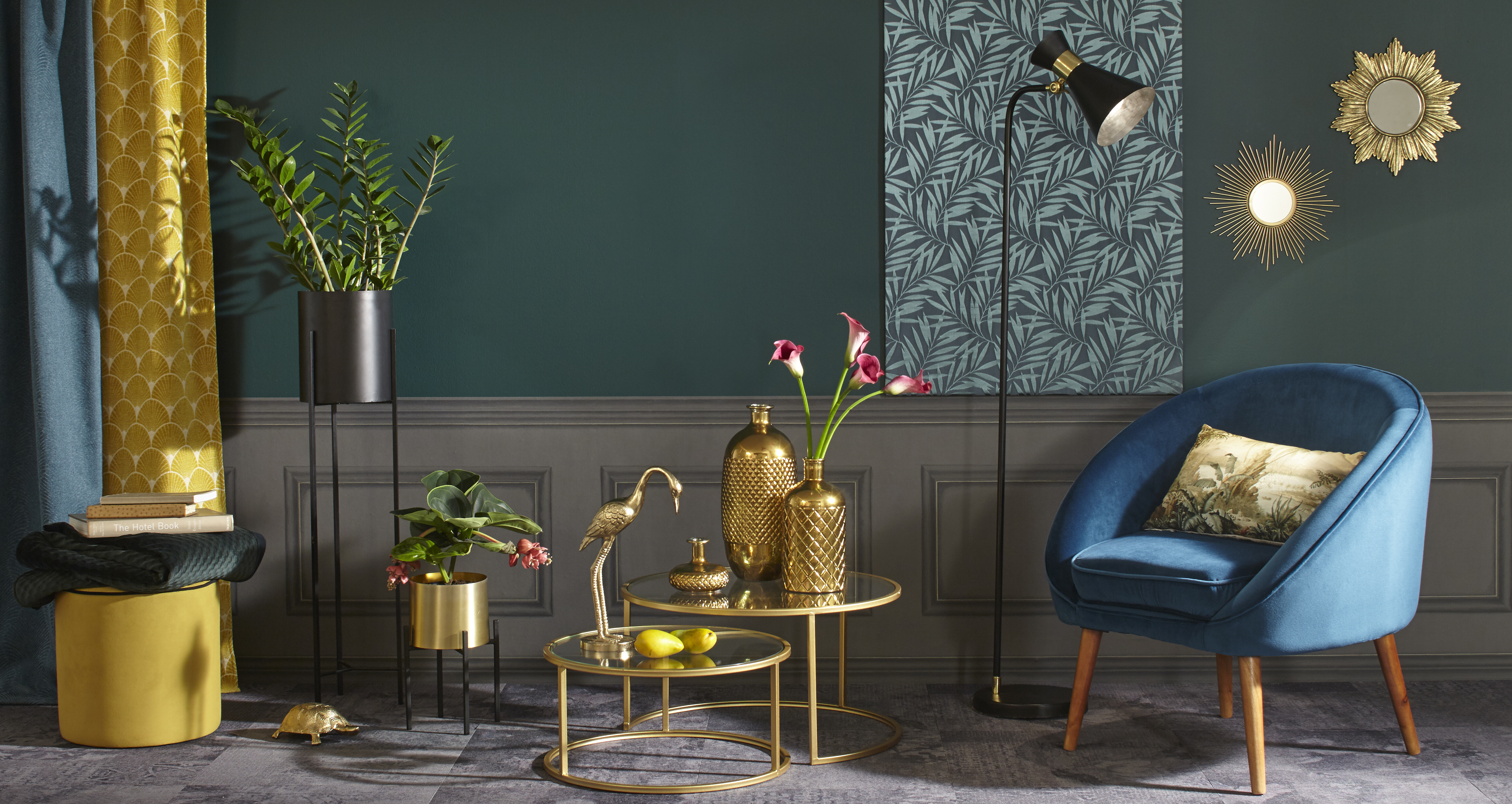 Nouvelle collection Bouchara